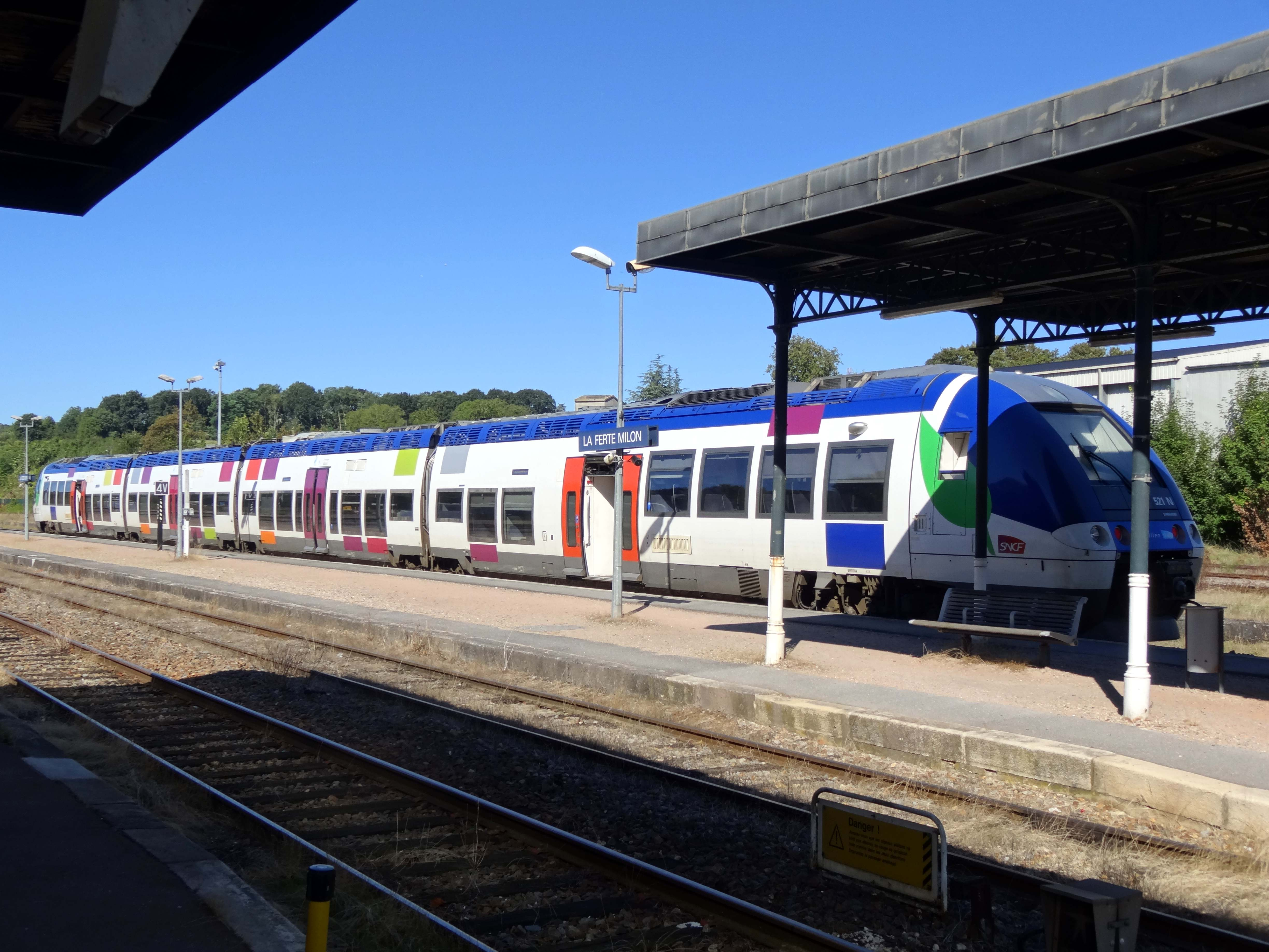 Gare SNCF, train à destination de Meaux.